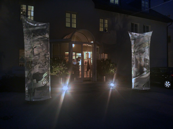 Eingangsportal der Galerie in der Schmiede; Ausstellungseröffnung "Erfühlte Lebenswelgen" von Beni Altmüller